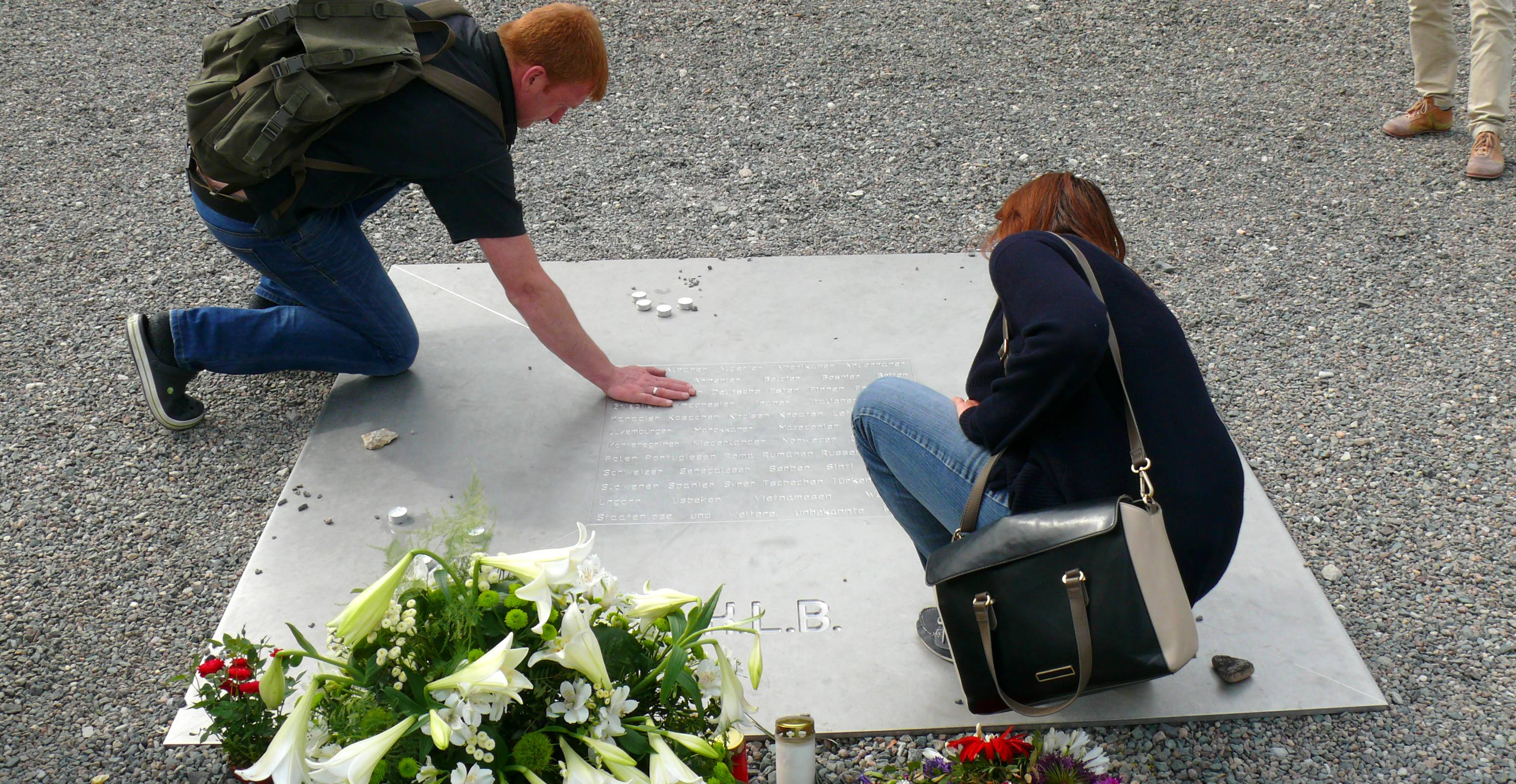 Warmes Mahnmahl - Gedenkplatte auf dem Appelplatz